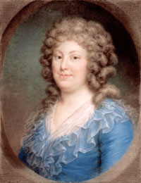 Friederike Luise von Hessen-Darmstadt (1751–1805), zweite Gemahlin König Friedrich Wilhelms II. von Preußen.